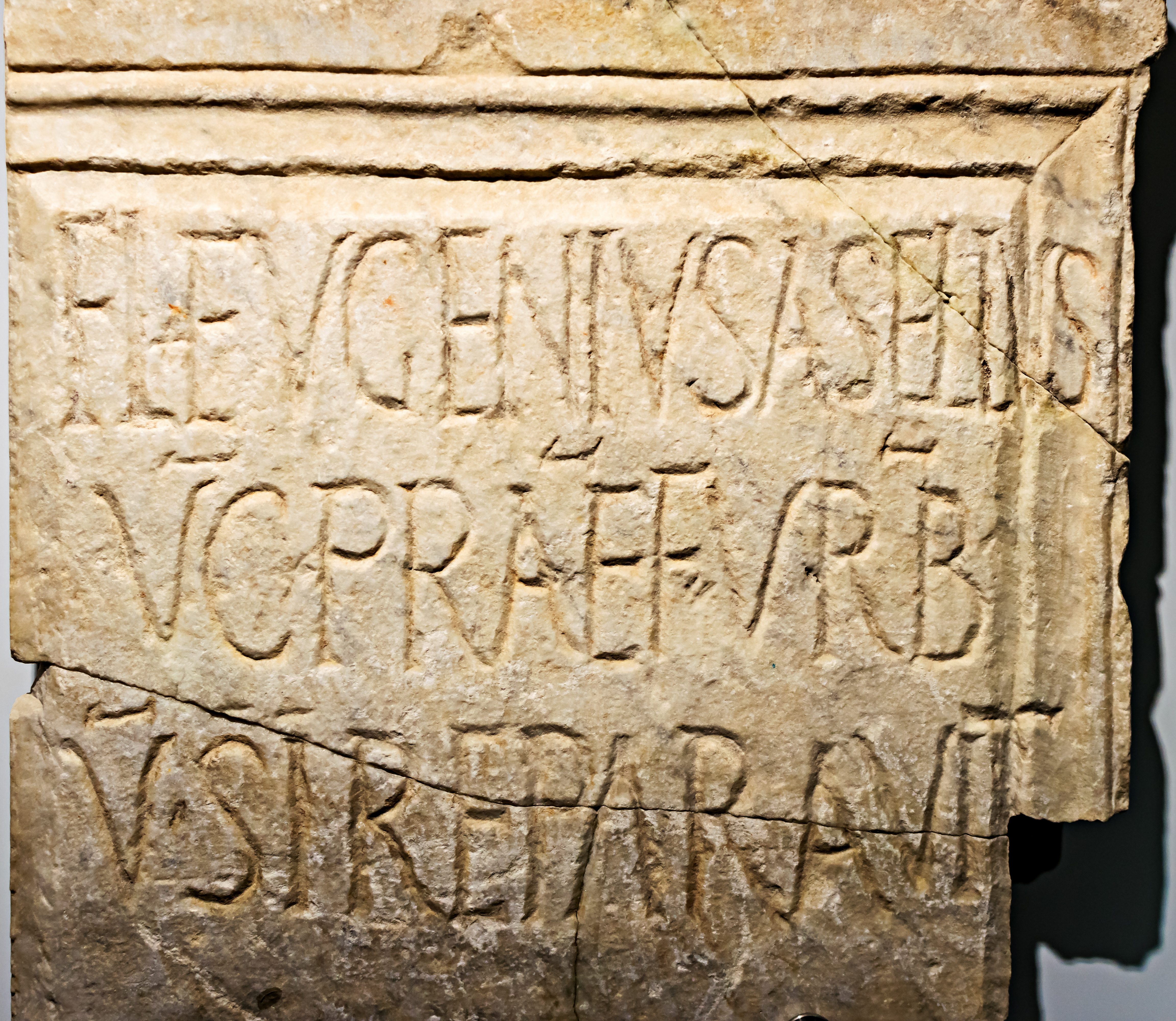 In der Inschrift ist eine von Flavius Eugenius Asellus durchgeführte -ein Stadtpräfekt von Rom im 5. Jahrhundert- Restaurierung an der Basilika St. Paul außerhalb der Mauern aufgezeichnet. Gefunden an einer Säulenbasis im Querschiff der Basilika S. Paul vor den Mauern. Ausgestellt im Museo Nazionale Romano.